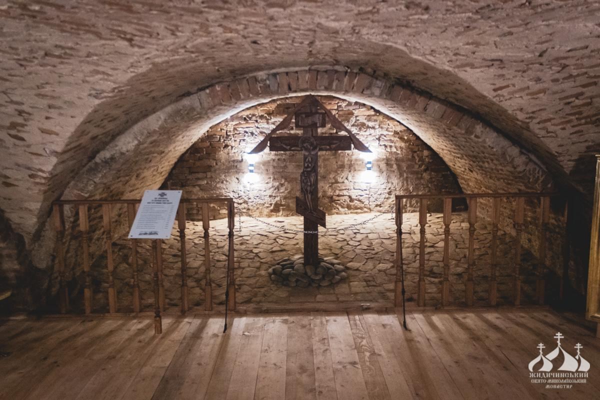 Підземелля Миколаївського храму с. Жидичин